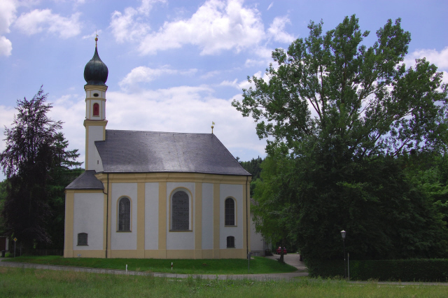 Marterkapelle St. Emmeram (Haus Nr. 28), Barockbau, 1740-52, Kleinhelfendorf